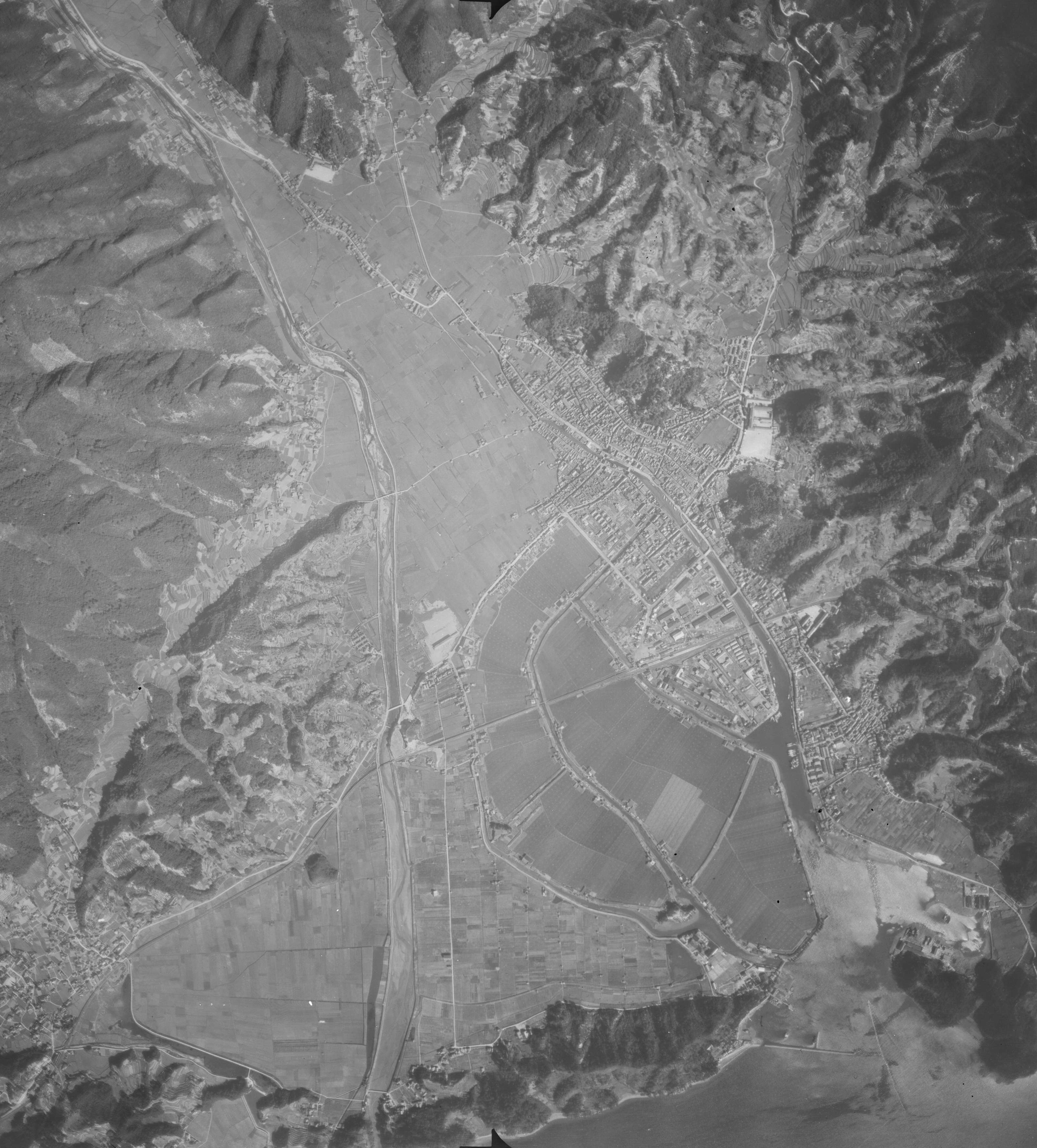 1947年広島県竹原市の市街地